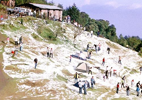 Cerro El Pital se encuentra a 12 kilómetros de La Palma, con una altura de 2730 msnm es el punto más alto del territorio Salvadoreño. Es una montaña en medio de un bosque nebuloso que suele tener una temperatura aproximada de 10 ºC. El 13 de abril de 2004, las temperaturas bajaron tanto que el cerro fue cubierto por una escarcha de hielo que causó conmoción entre los pobladores, atribuyendo el fenómeno a una supuesta "nevada".